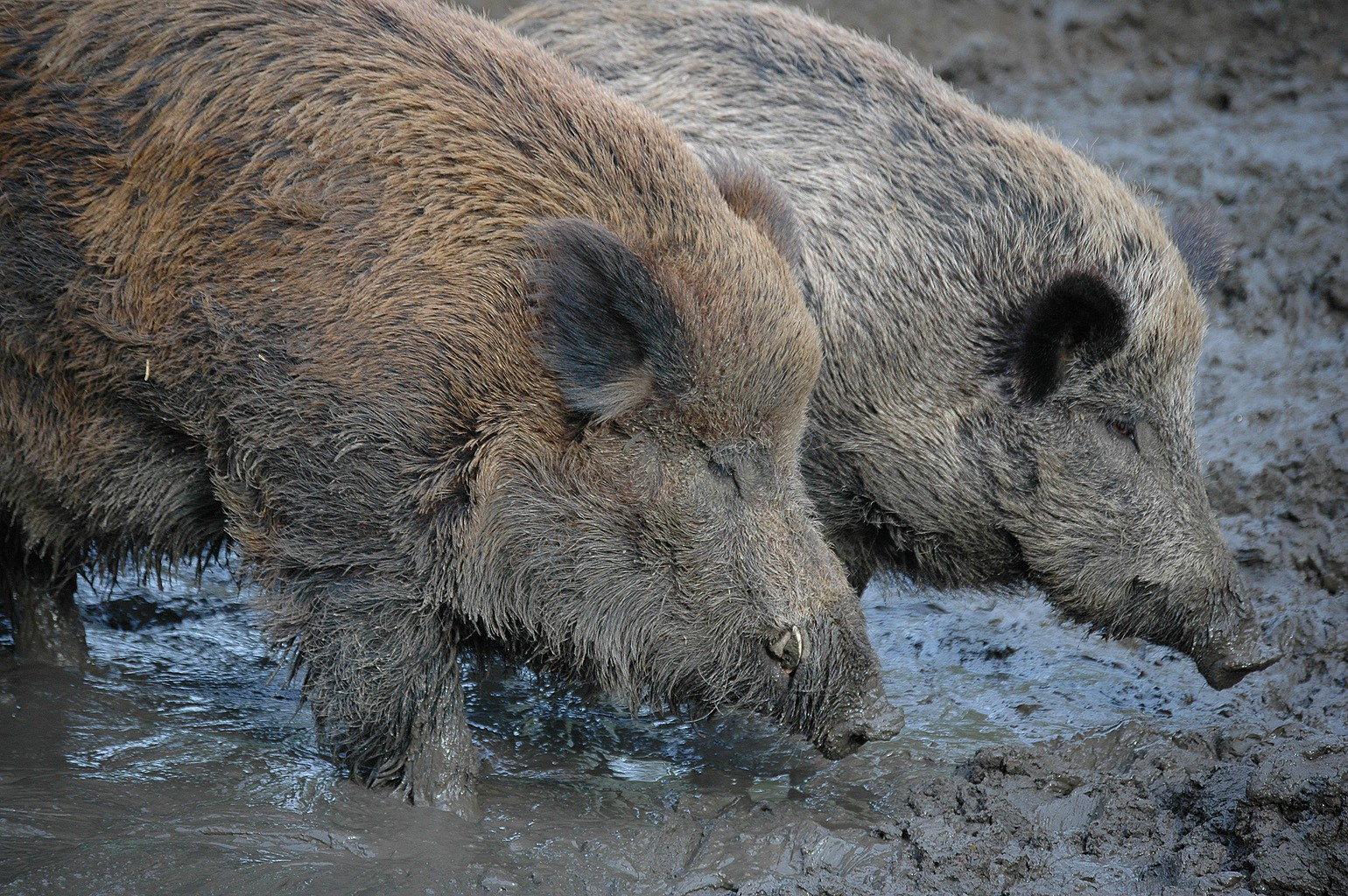 Wild boar spotted in Dierenpark Planckendael, Belgium